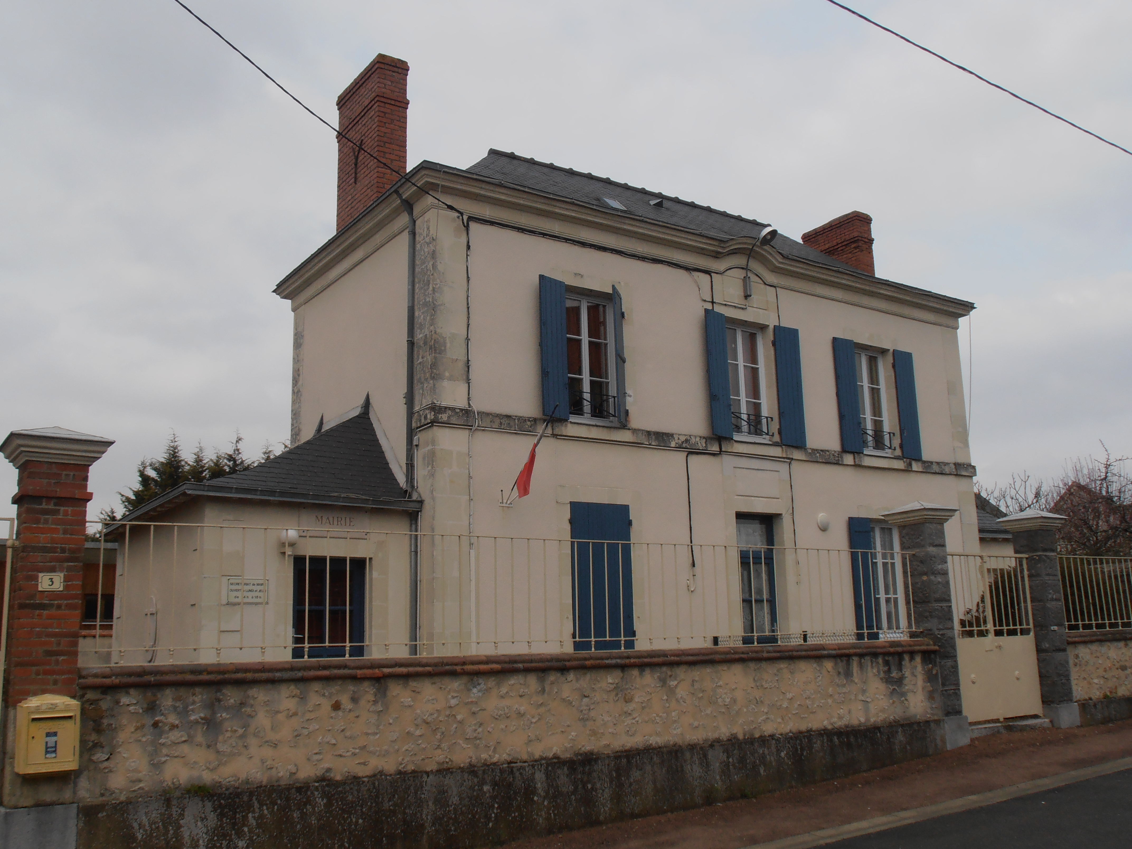 La mairie de Pincé, Sarthe, France